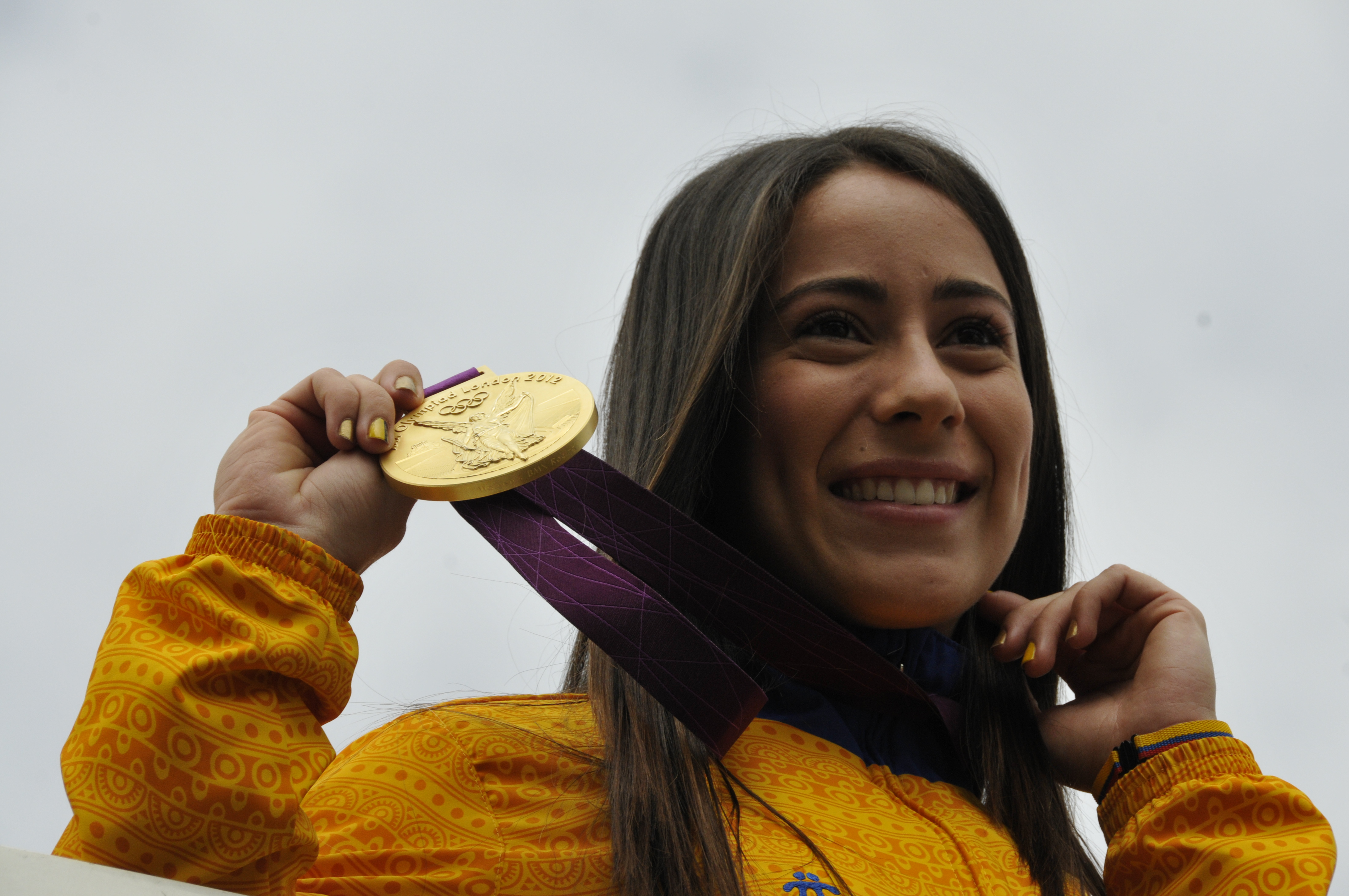 Caravana de medallistas olímpicos